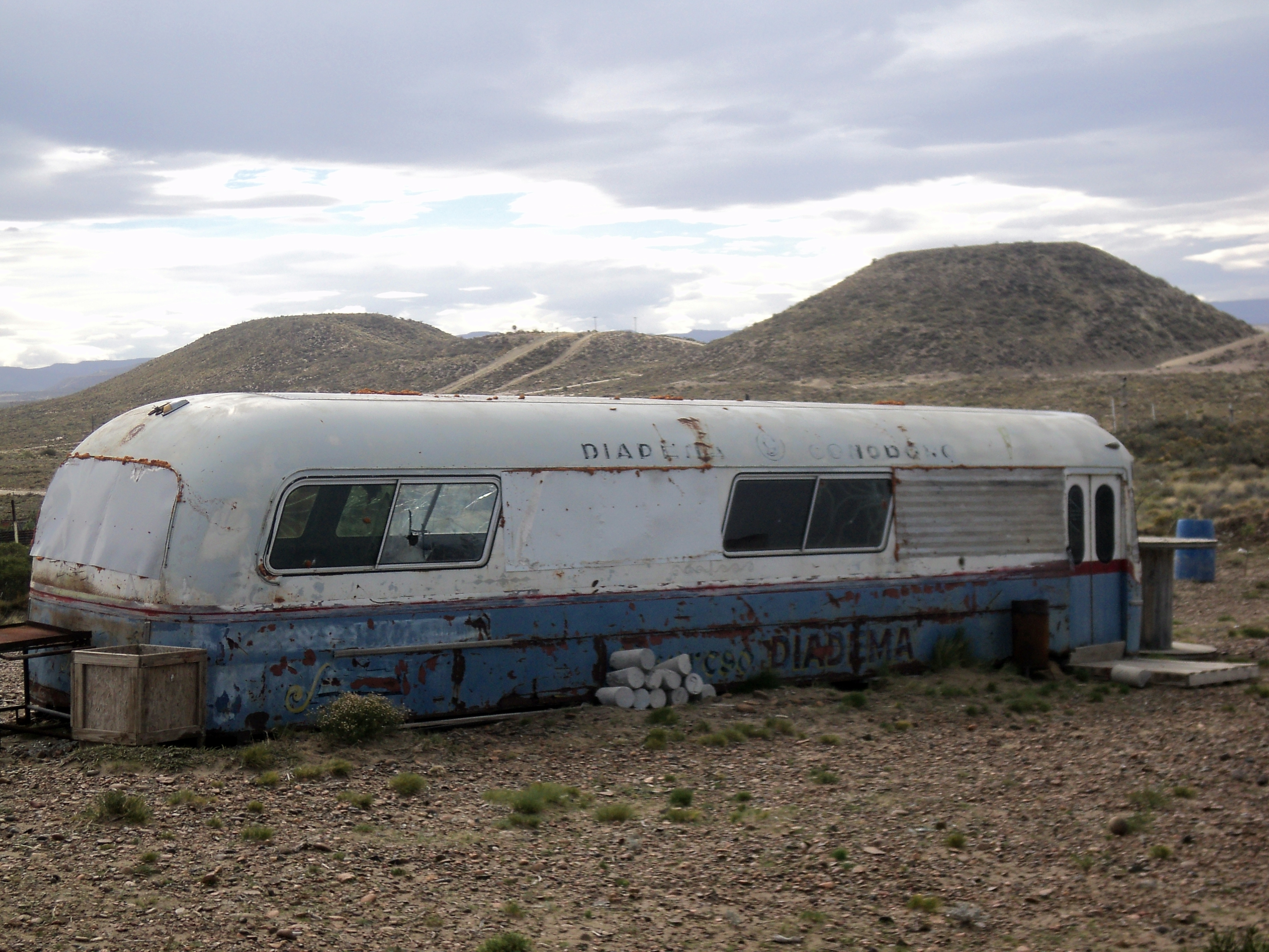 Restos del coche motor que unía Diadema con la terminal central